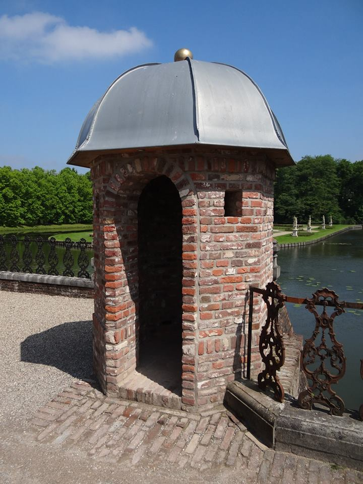 Wasserburg Anholt